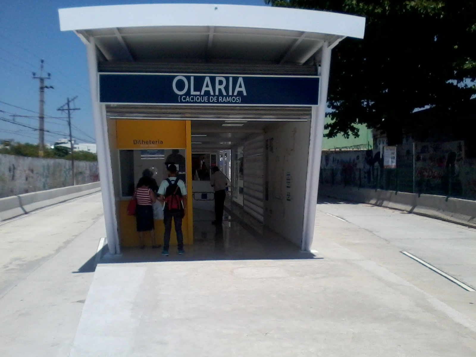 Entrada da Estação Olaria próximo a estação férrea de Olaria